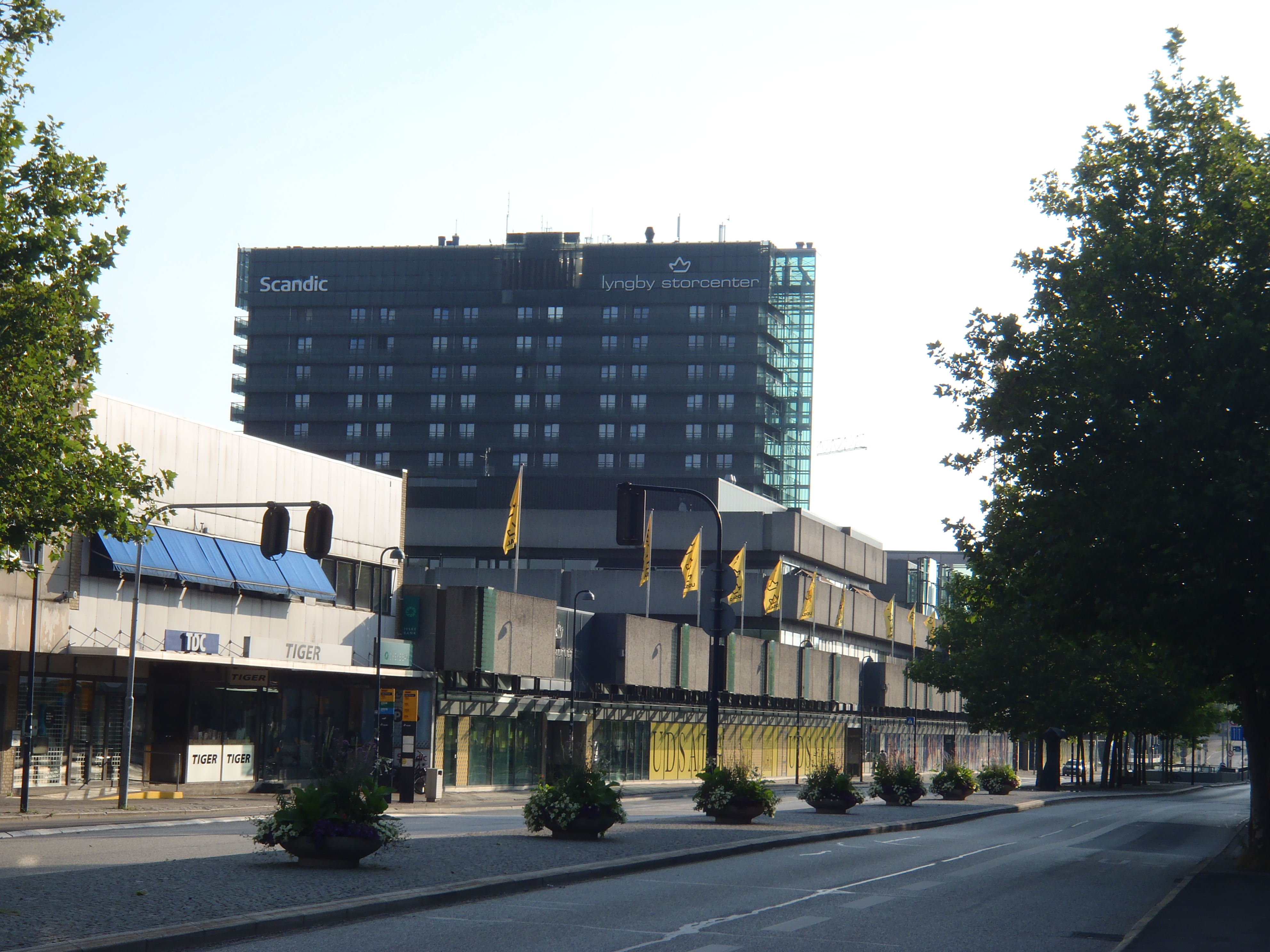 Lyngby Storcenter set fra Klampenborgvej. TDC og Tiger butikkerne og Scandic hotel ses også.